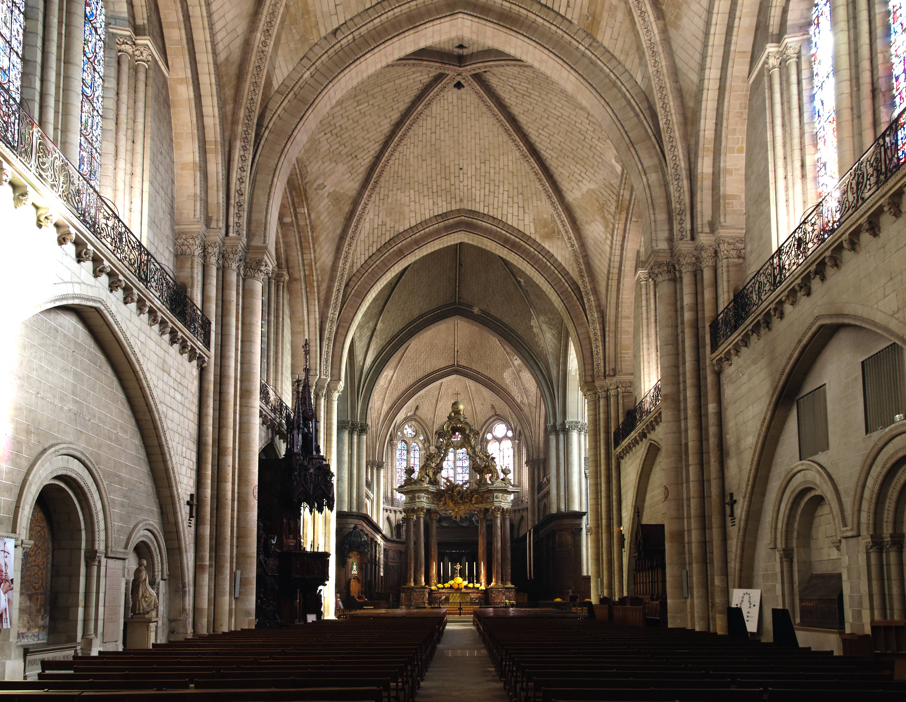 Nef de la cathédrale Saint-Maurice